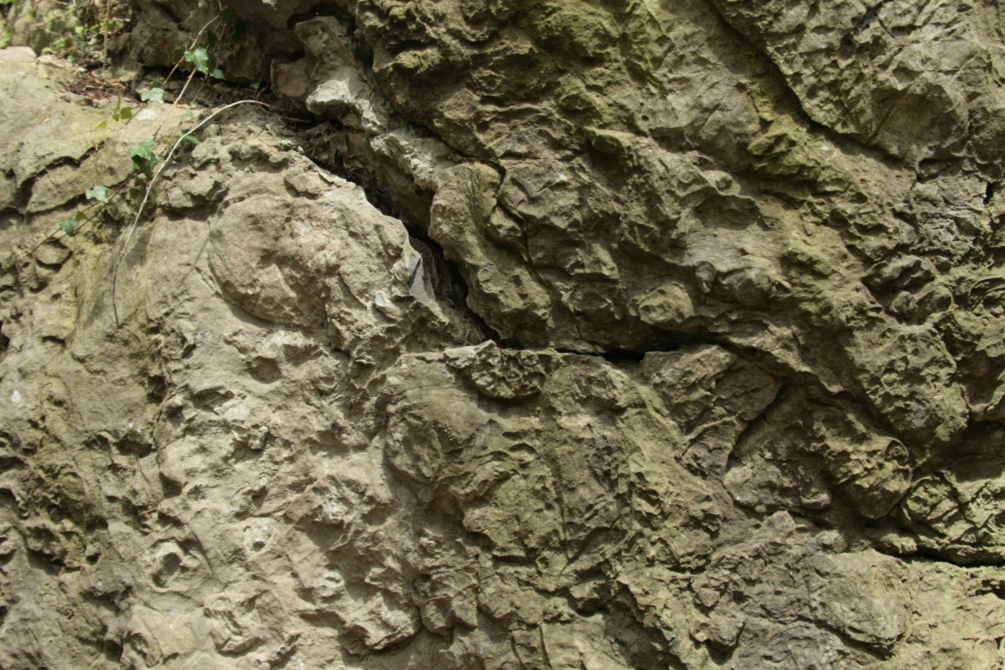 Urzeitliche Spuren von Rifforganismen im Naturschutzgebiet und nationalem Geotop Felsenmeer bei Hemer, NSG Kennung MK 001